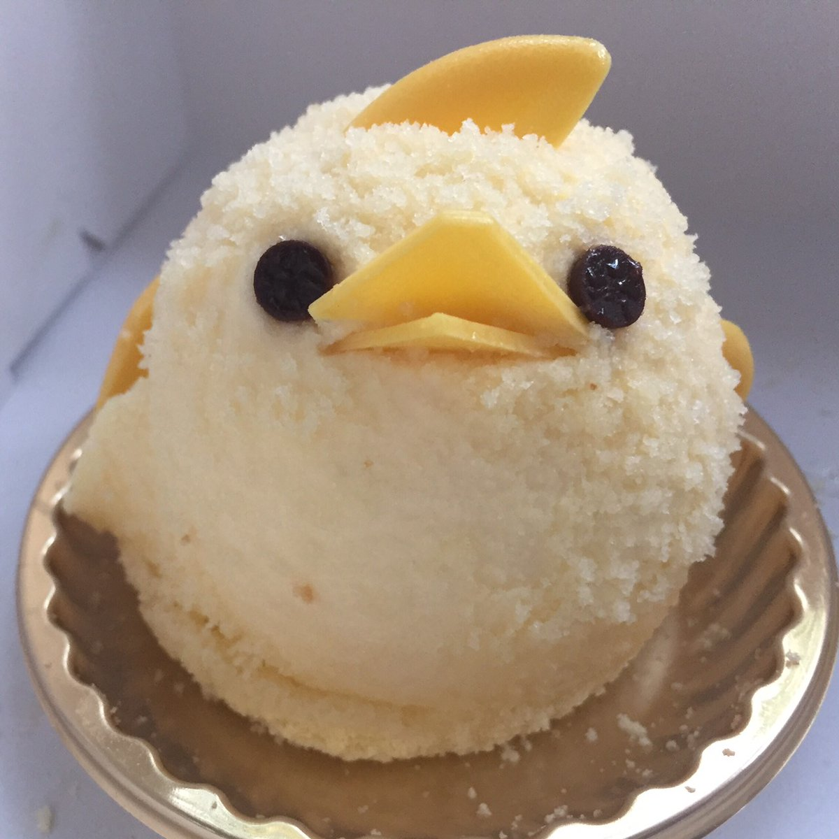 名古屋名物 ぴよりん